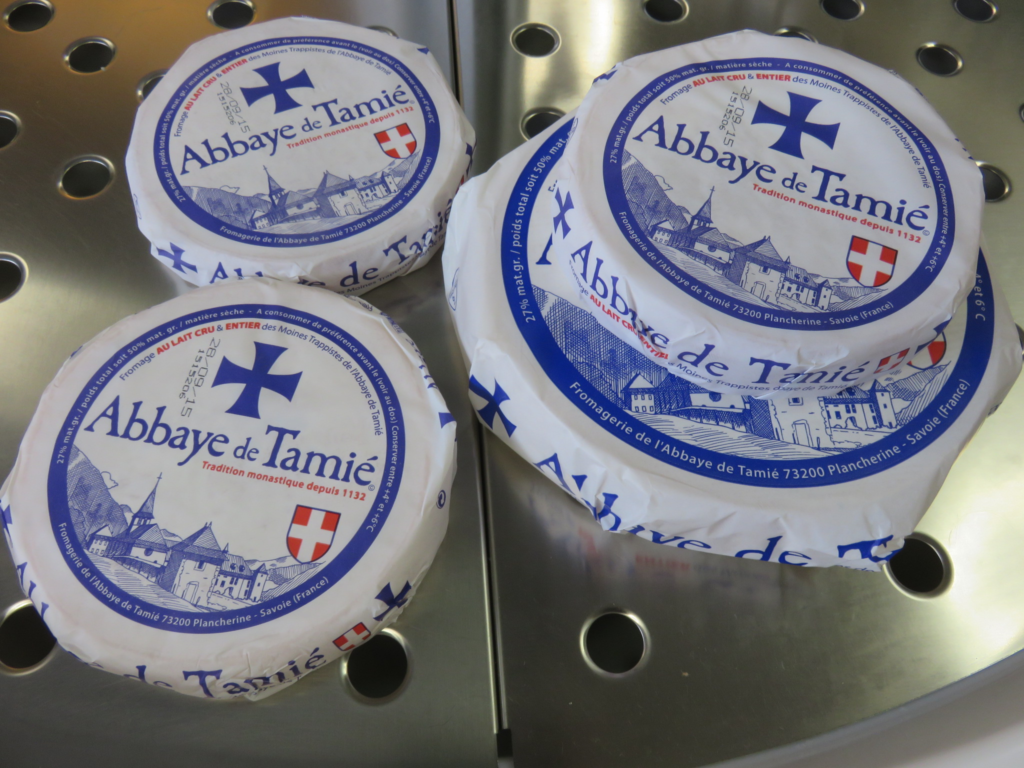 Abbaye de Tamié (cheese)